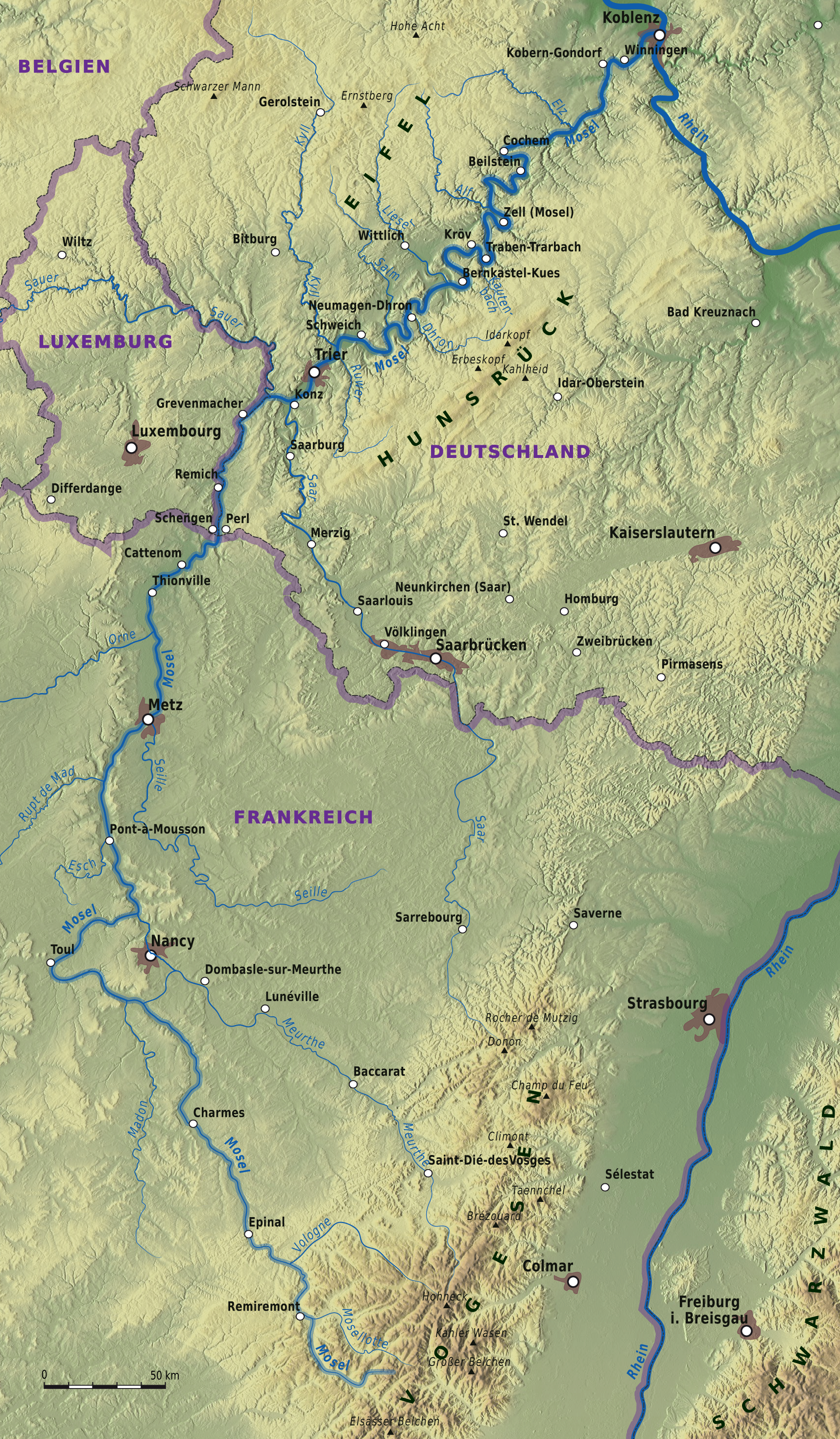 Verlaufskarte der Mosel.